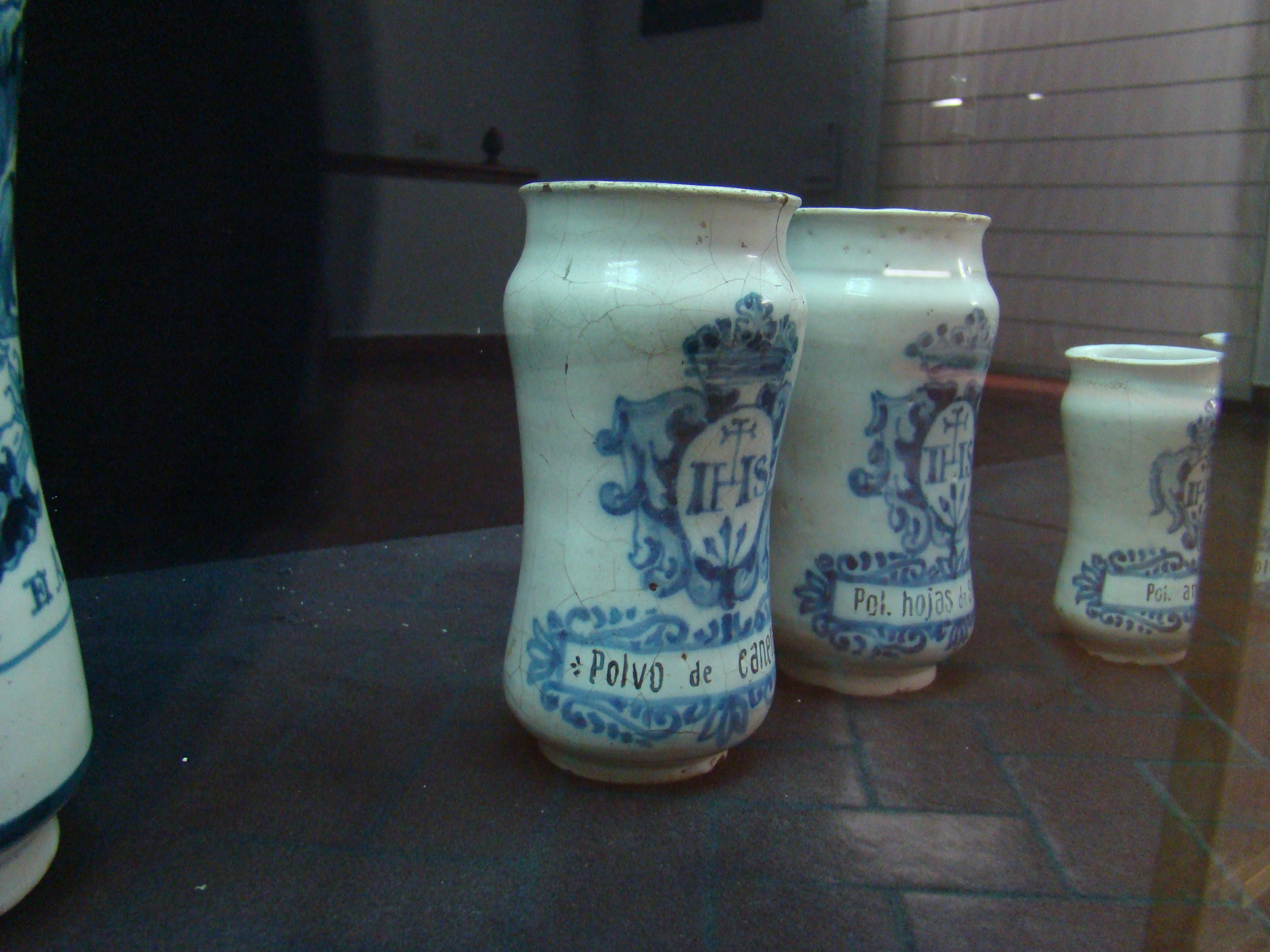 Botamen de la botica del Colegio de San Ignacio (jesuitas) en Valladolid, España. Cuando la expulsión de los jesuitas todo el material de la botica pasó al hospital de la Resurrección. Después de la desaparición de este hospital parte de los botes se guardaron en el museo de Valladolid.